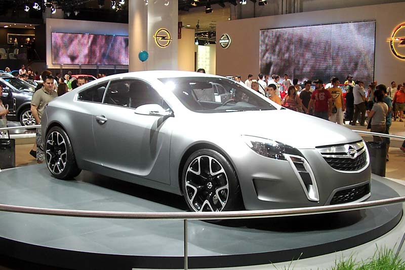 Opel GTC Concept en el Salón del Automóvil de Barcelona 2007